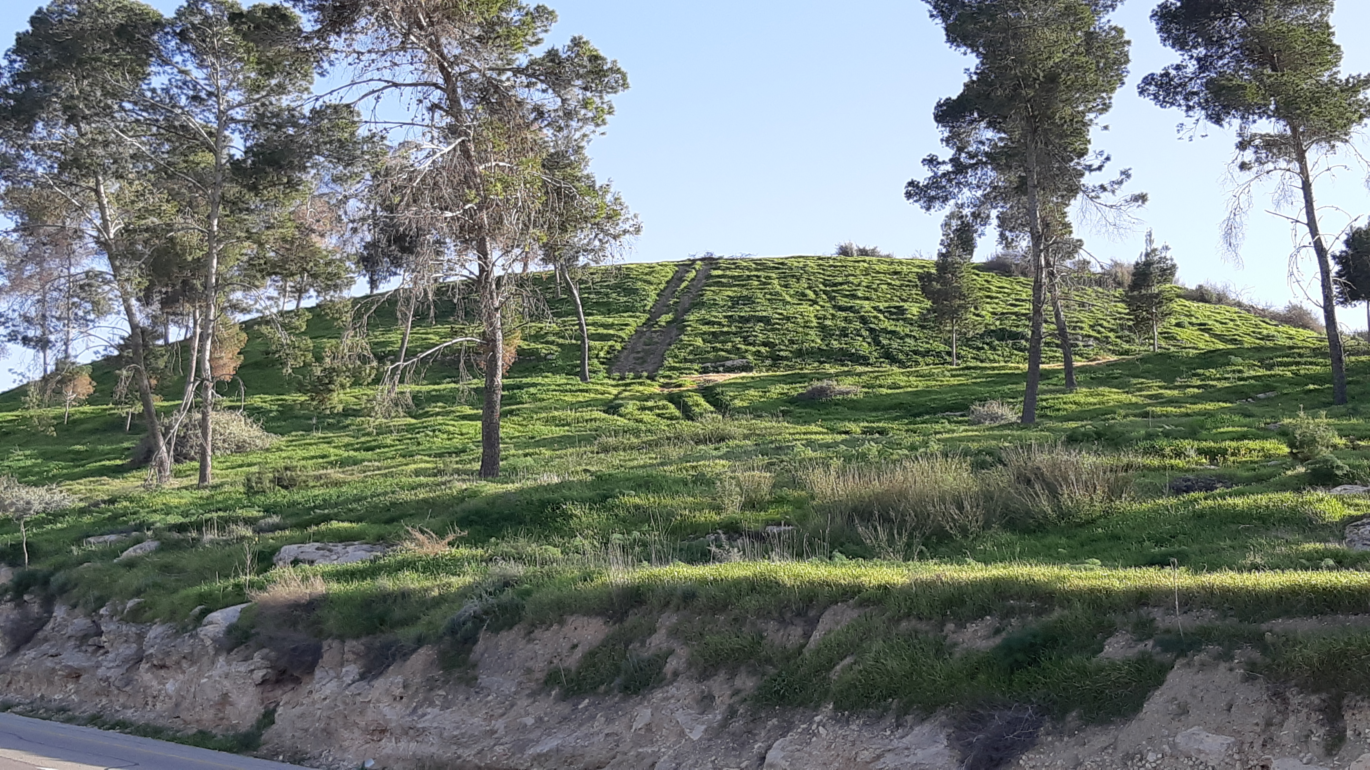 תל חליף - מבט מצפון